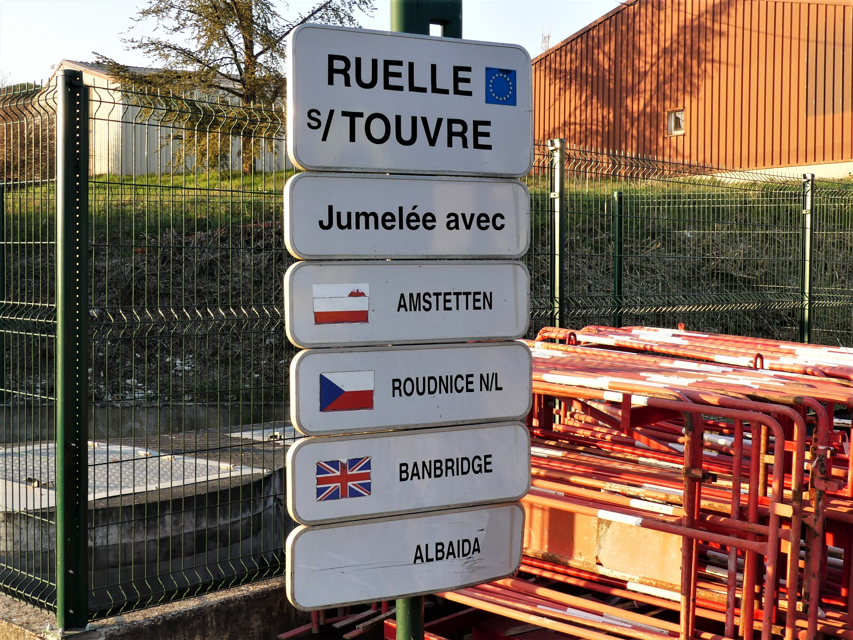 Panneau des jumelages de Ruelle-sur-Touvre, Charente, France.